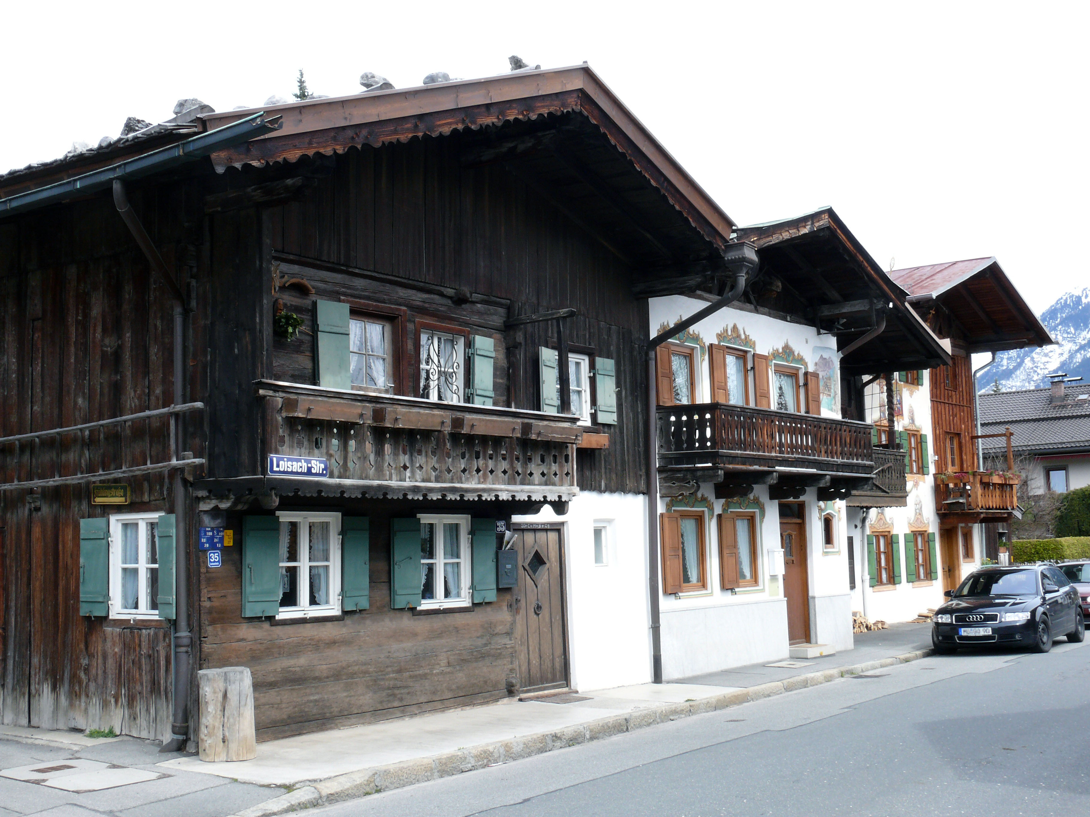 Denkmalgeschütztes Ensemble Loisachstraße in Garmisch-Partenkirchen